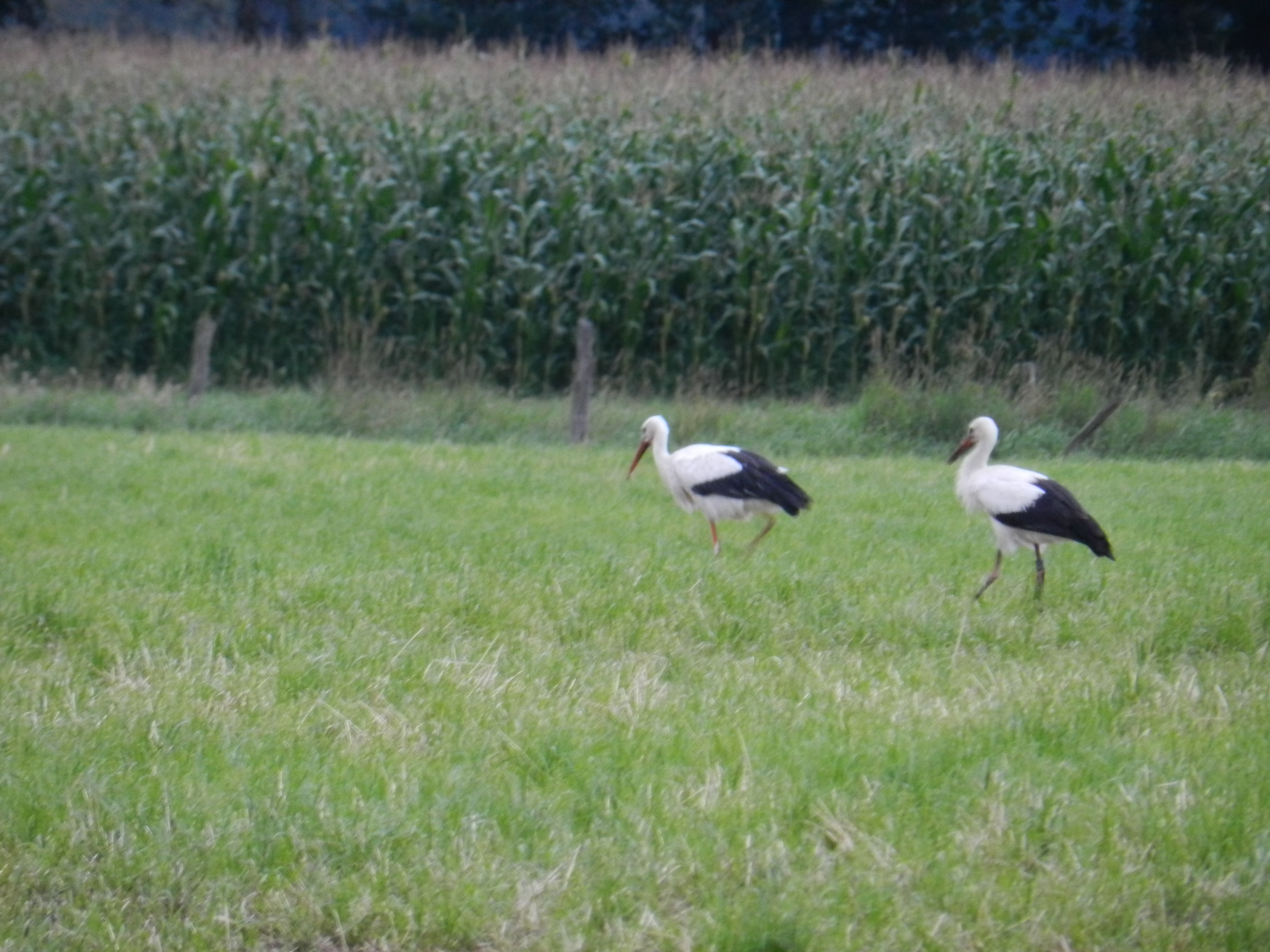 Storchenpaar im Hervester Bruch, eventuell Werner und Luise (?); Rand des Naturschutzgebiets „Bachsystem des Wienbaches“ (NSG RE-049) in Dorsten